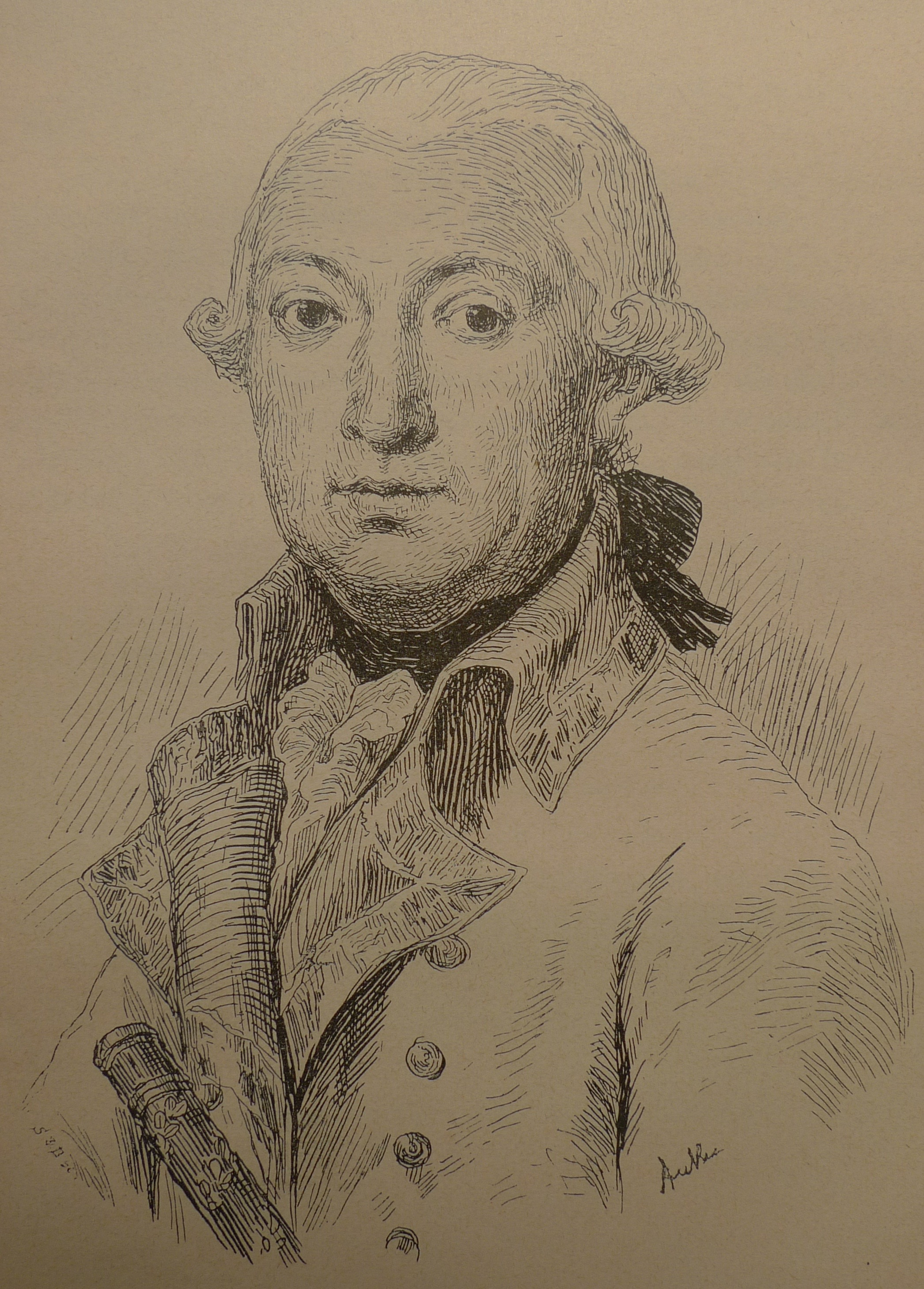 Albert Anker: General Sigmund Freiherr von Renner. (nach einem verschollenen Porträt) Aus Wolfgang Friedrich von Mülinen: Sigmund von Renner 1727–1800. In: Sammlung Bernischer Biographien, 3. Band, 1. Lieferung, Bern 1896, S. 13–18.